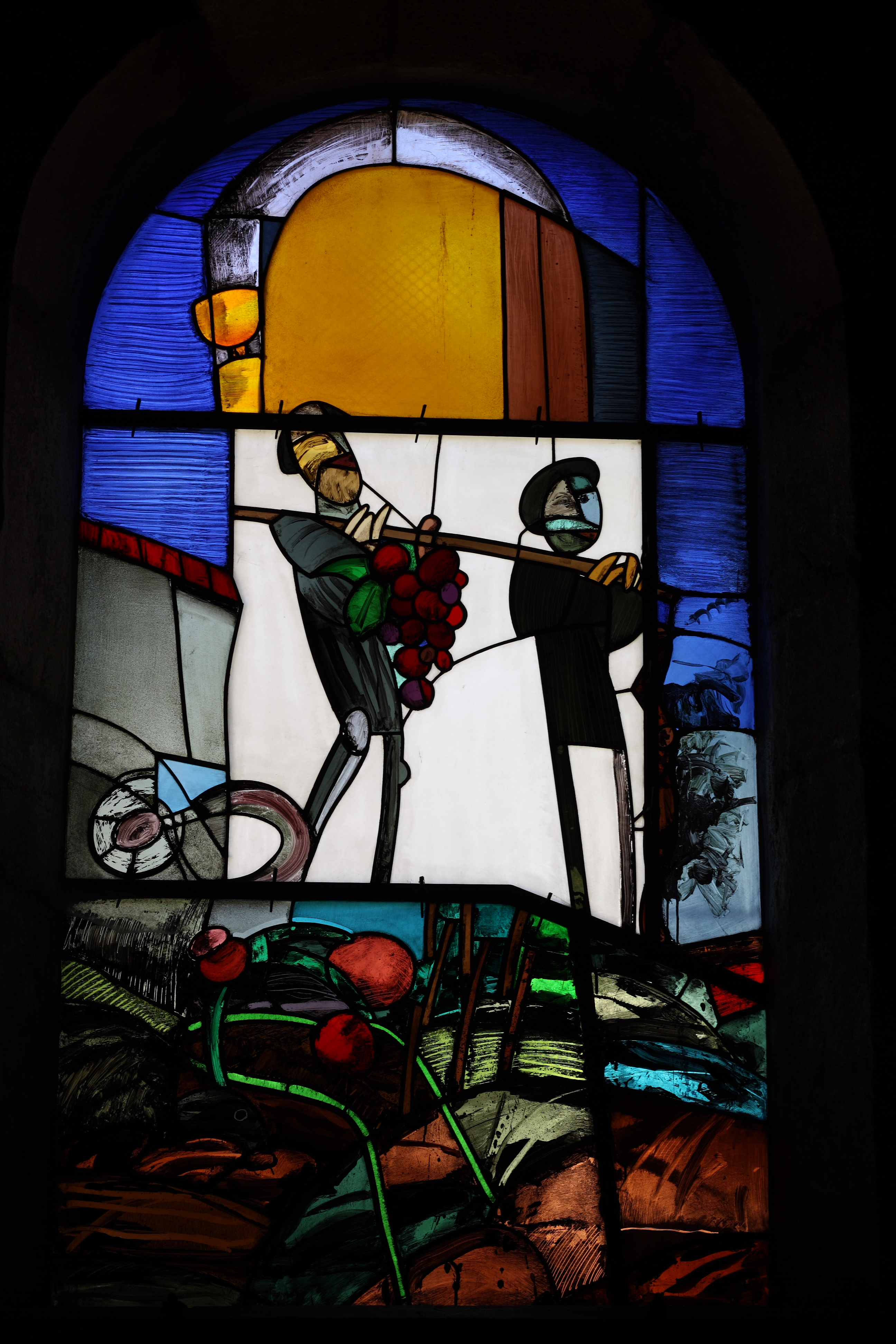 Bleiglasfenster in der Kirche Saint-Just in Arbois, Darstellung: Biou